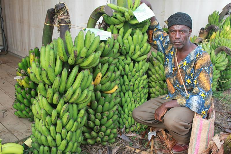 un cultivateur avec ses régines de Bananes